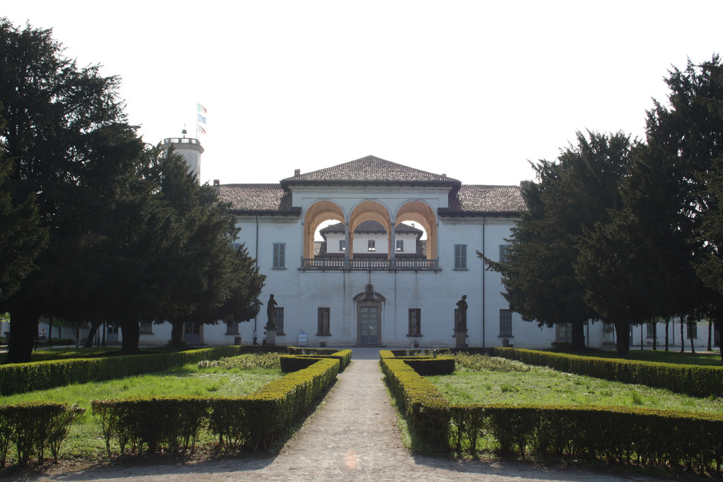 Foto del Palazzo Borromeo situato a Cesano Maderno, visto dal parco.